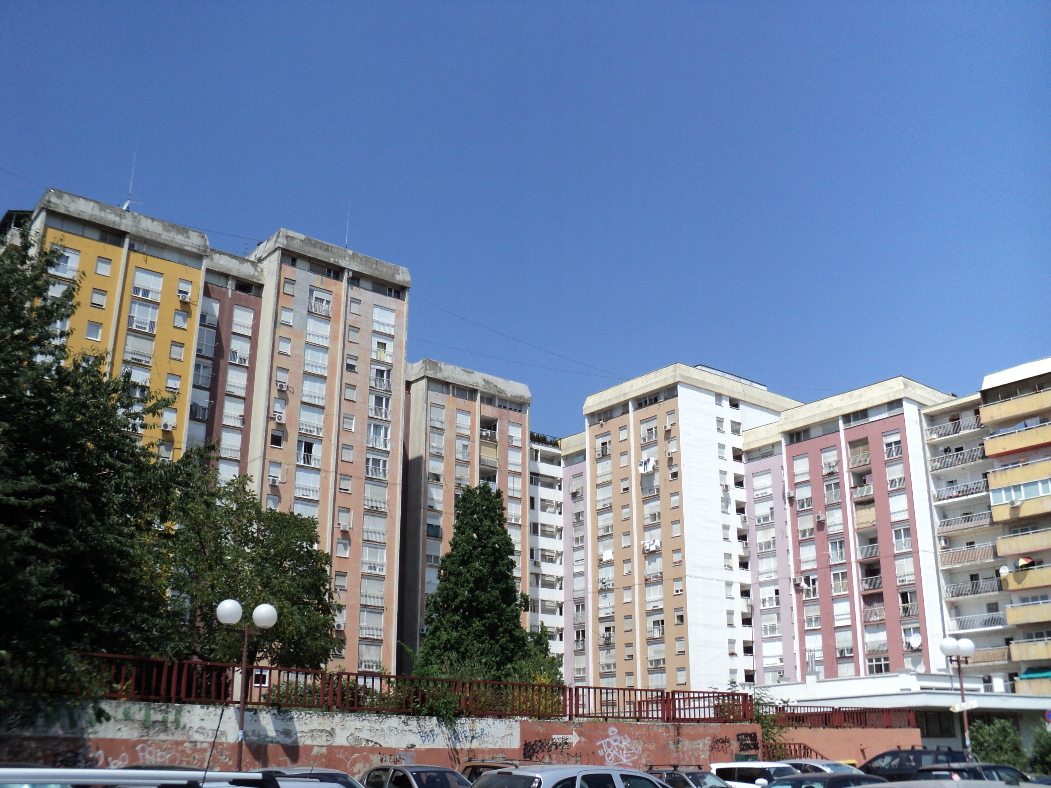 Zgrade, kolokvijalno poznate pod imenom Papagajke, Trešnjevka, Zagreb.